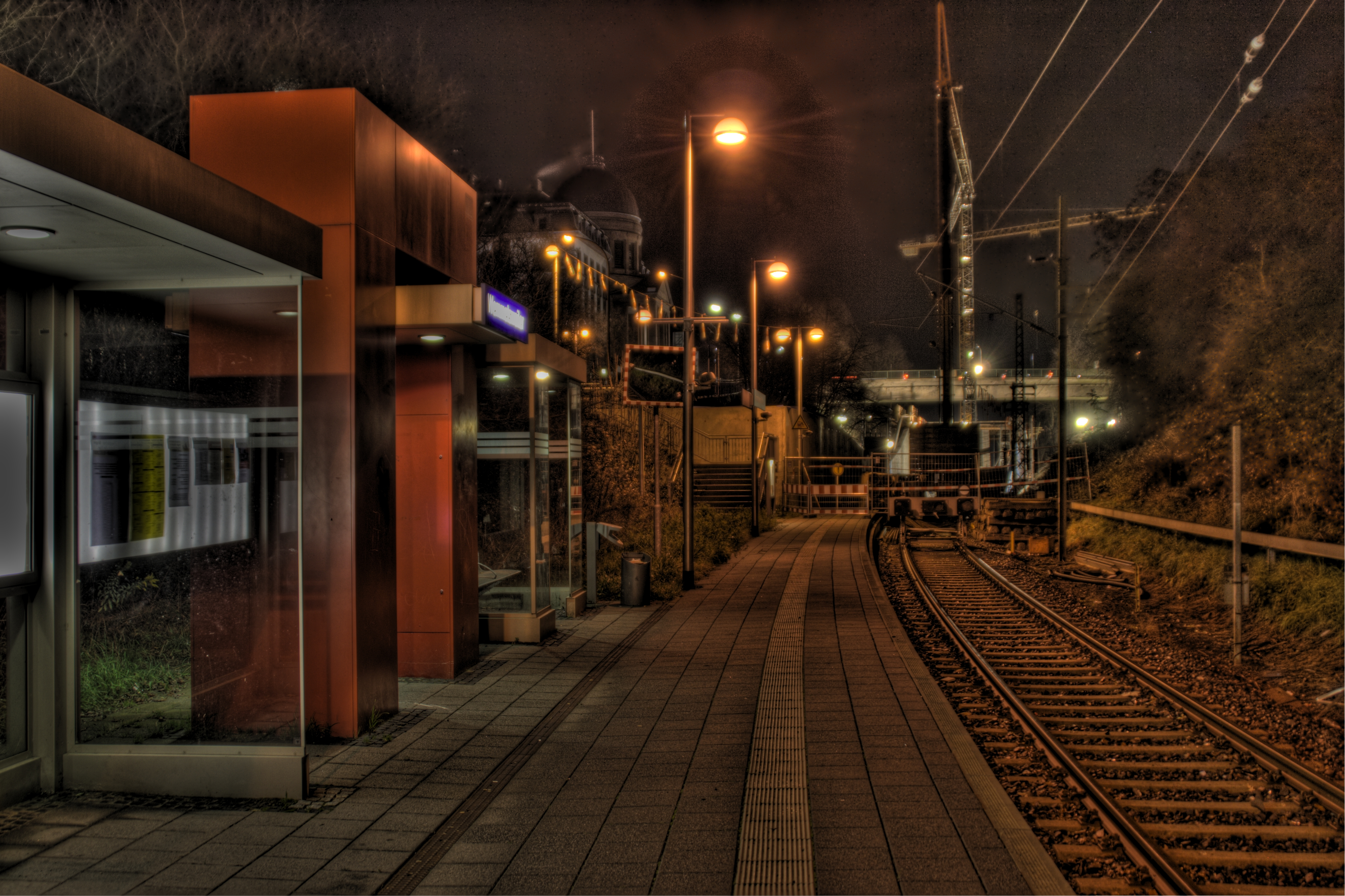 Bahnsteig